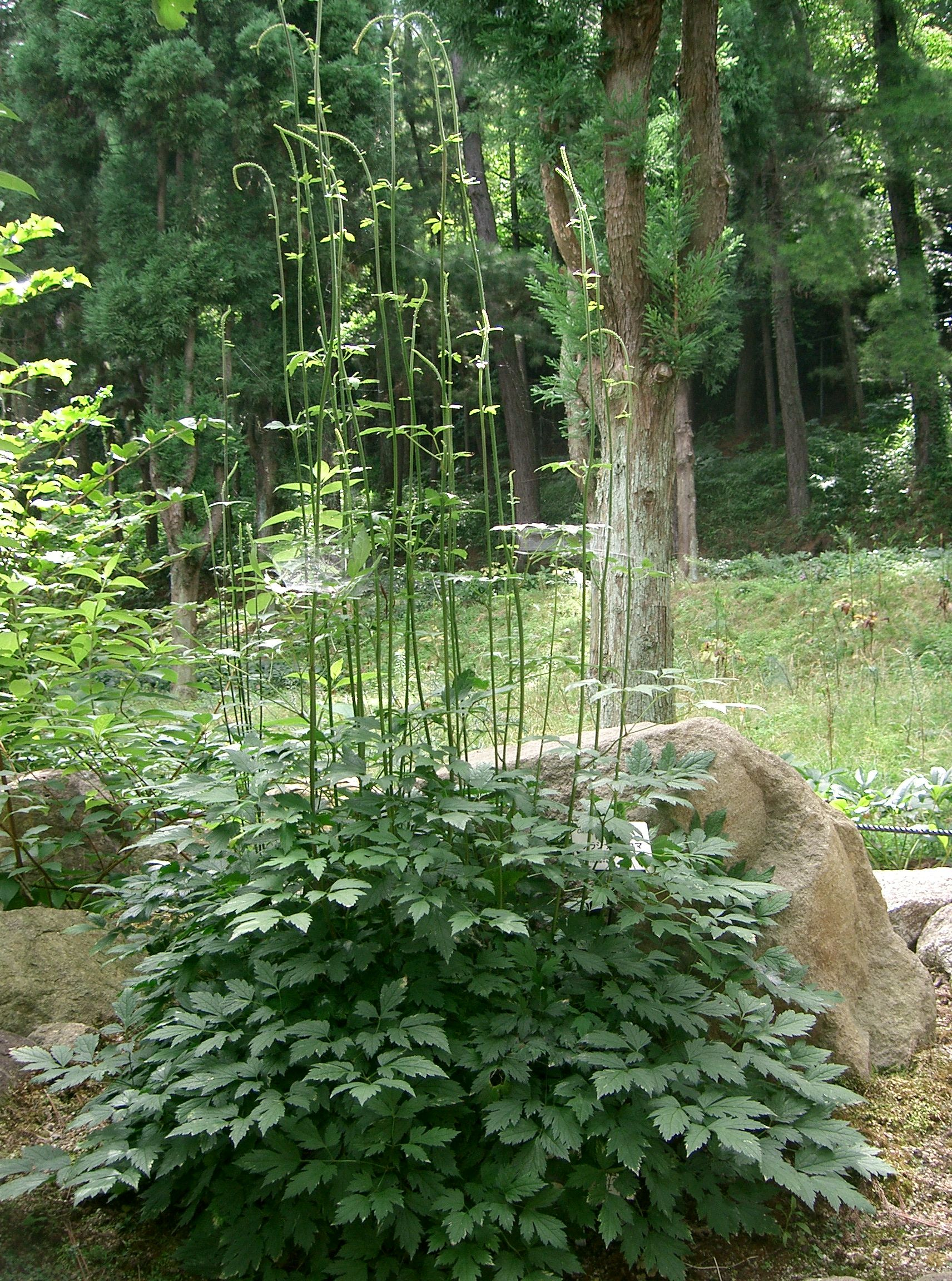 Cimicifuga simplex